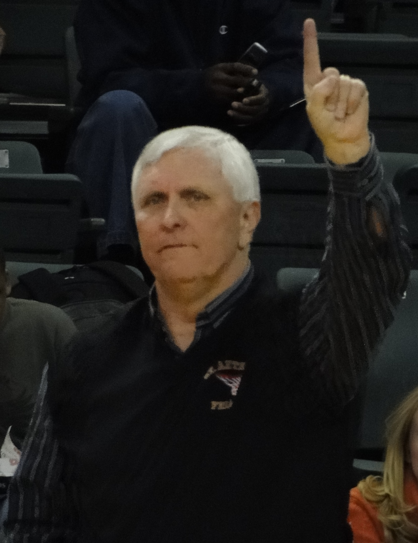 Bob Hurley